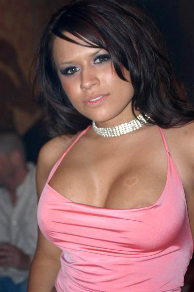 Eva Angelina